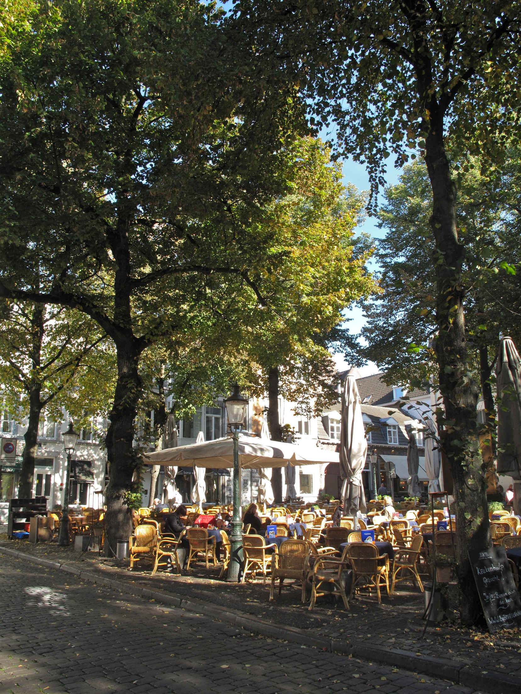 randonnée urbaine 11.10.10